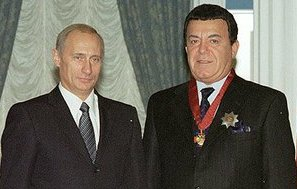 Награждение Иосифа Кобзона Орденом "За заслуги перед Отечеством" II степени